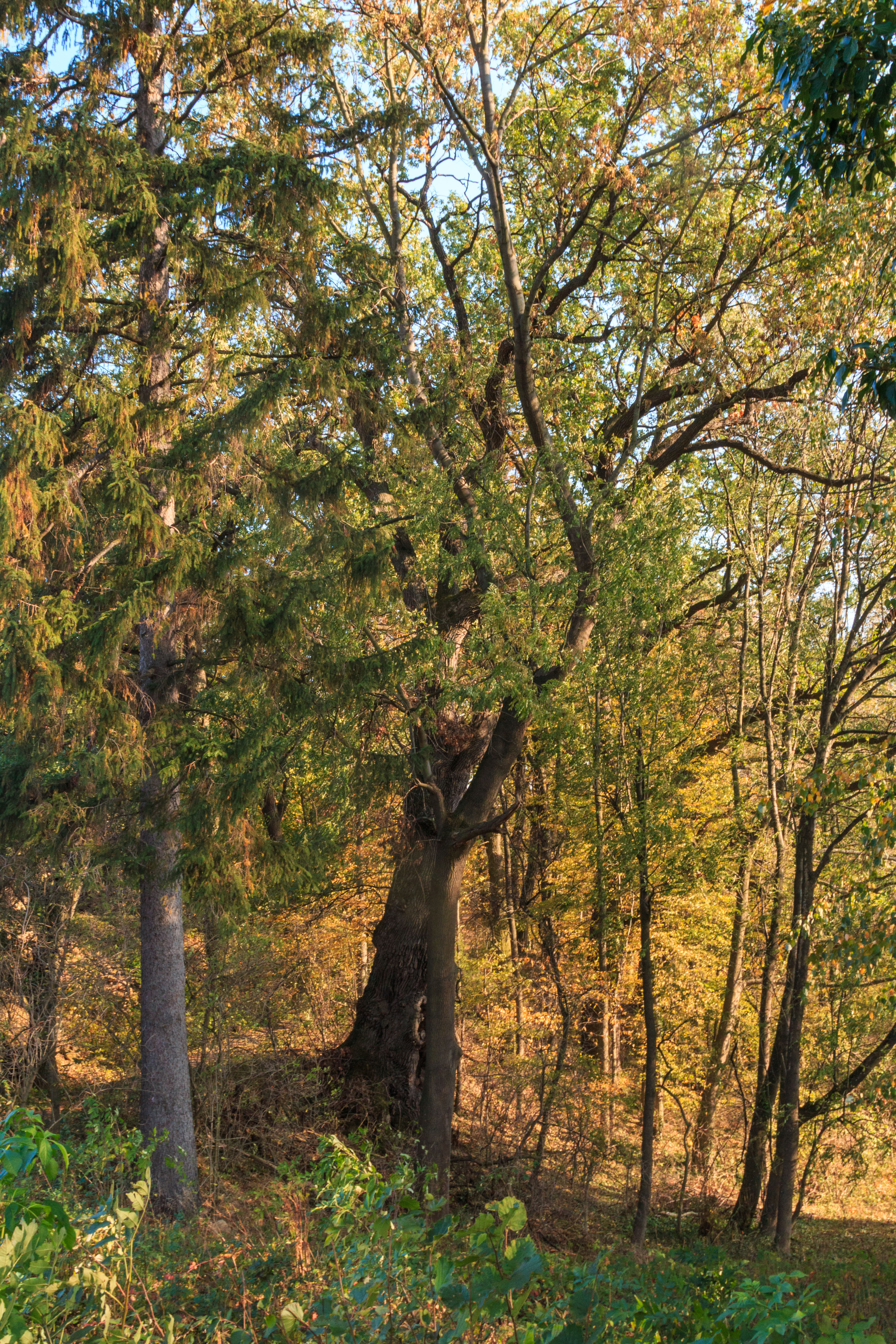 Památné duby na hrázi bývalého rybníka u Libáně Project: Vodstvo. Ticket: 1618.